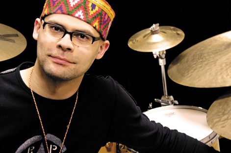 Bartłomiej Oleś, perkusista, kompozytor